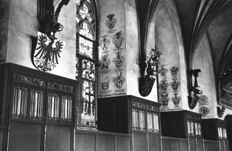 Marienburg, Westpreußen Fensterseite des "Großen Remters"